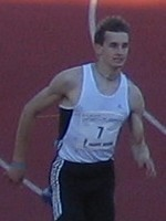 Juhani Mikkola Paavo Nurmen kisoissa, Paavo Nurmen stadionilla, Turussa, 24. kesäkuuta 2009